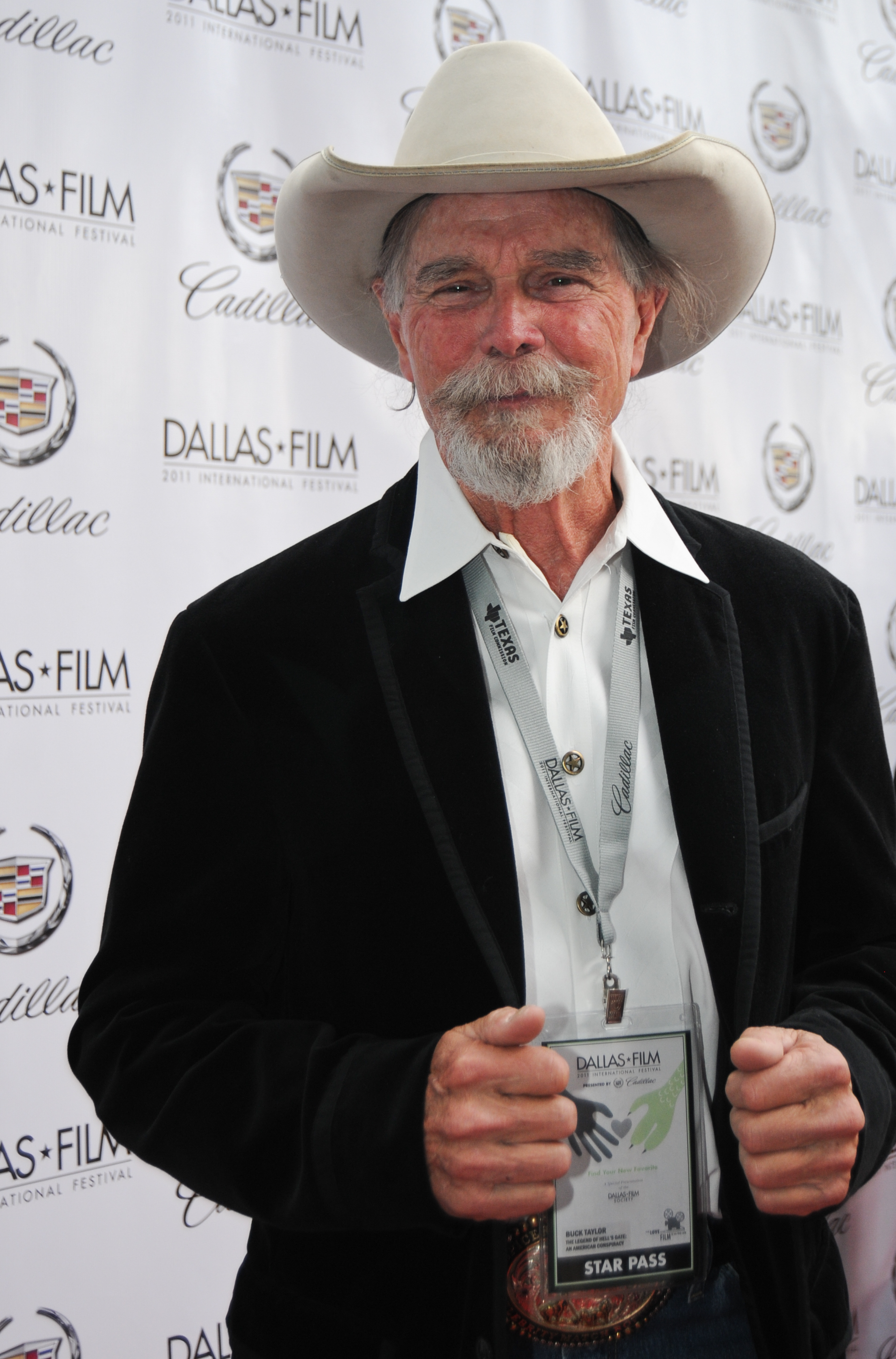 Buck Taylor